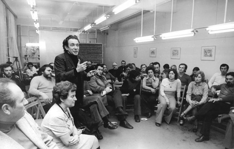 Berlin, Diskussion Künstler - Werktätige, Besson ADN-ZB Settnik 20.2.76 Berlin: Diskussion zwischen Künstlern und Werktätigen Ein anregendes, für alle Beteiligten nutzbringendes Seminar über das Lehrstück "Die Ausnahme und die Regel" von Bertolt Brecht erlebten der Intendant der Berliner Volksbühne, Benno Besson (stehend), andere Künstler der Volksbühne sowie Arbeiter aus vier Berliner Betrieben und aus dem Stahlwerk der italienischen Stadt Terni vom 9. bis 20.2.76 im Berliner VEB Secura. Es ging bei den gründlichen Diskussionen, die von rezitierten und gespielten Szene unterbrochen wurden, darum, den Wert dieses Stückes und des Theaters überhaupt für ein heutiges Publikum von Werktätigen zu bestimmen. Dabei spielte auch die notwendige unterschiedliche Darstellungsweise desselben Stückes in einem sozialistischen Land wie der DDR und in einem von Klassengegensätzen geprägten Staat wie Italien eine Rolle. Ein ähnliches Seminar hatte Besson mit seinen Mitarbeitern vor einem Jahr mit den italienischen Arbeitern und Angestellten des Stahlwerks in Terni veranstaltet. Abgebildete Personen: Besson, Benno: Theaterregisseur, Schweiz (GND 118662597)